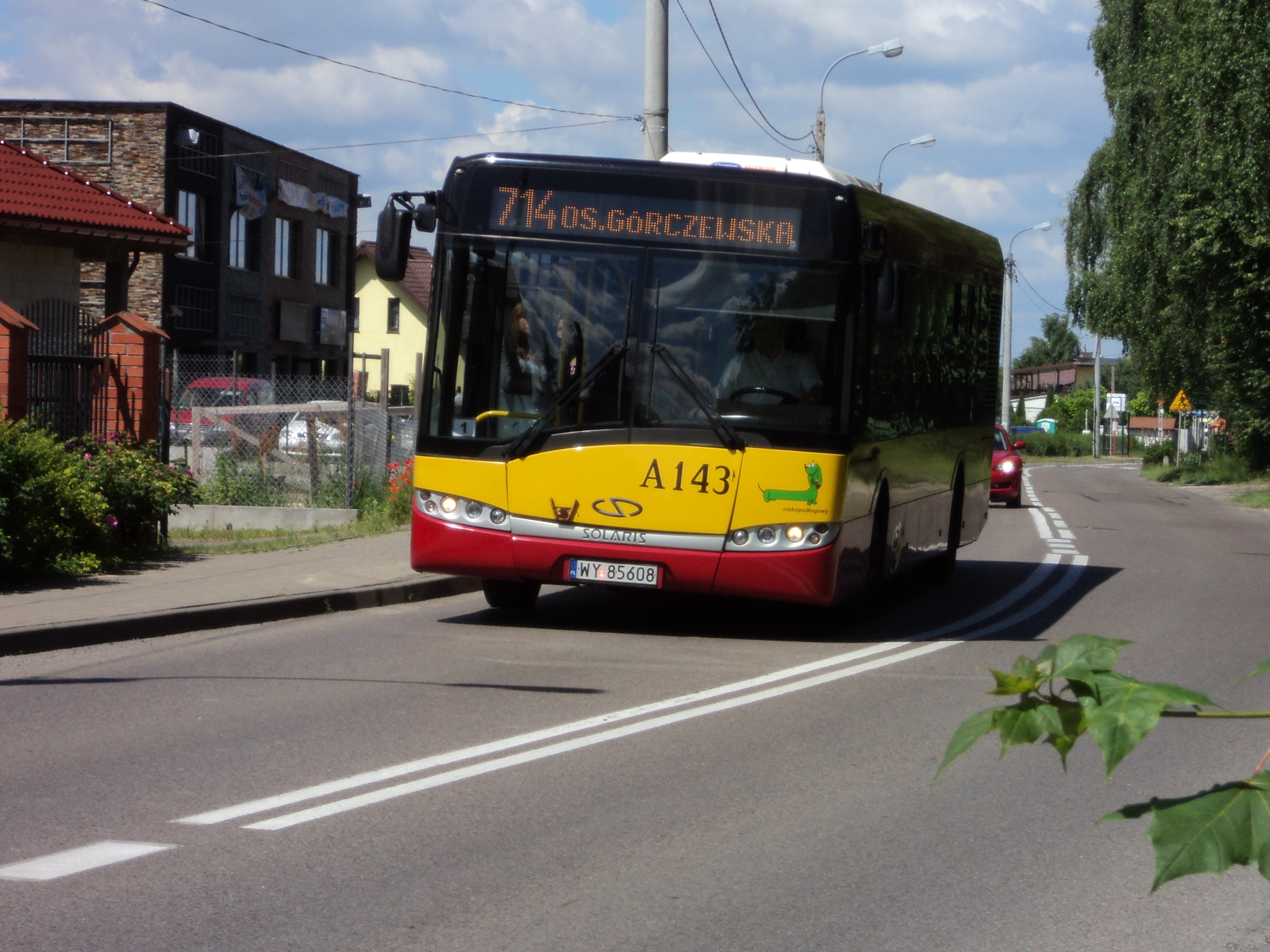 Autobus linii 714 obsługiwanej przez MZA jadący w kierunku Os.Górczewska przejeżdżający przez wieś Latchorzew